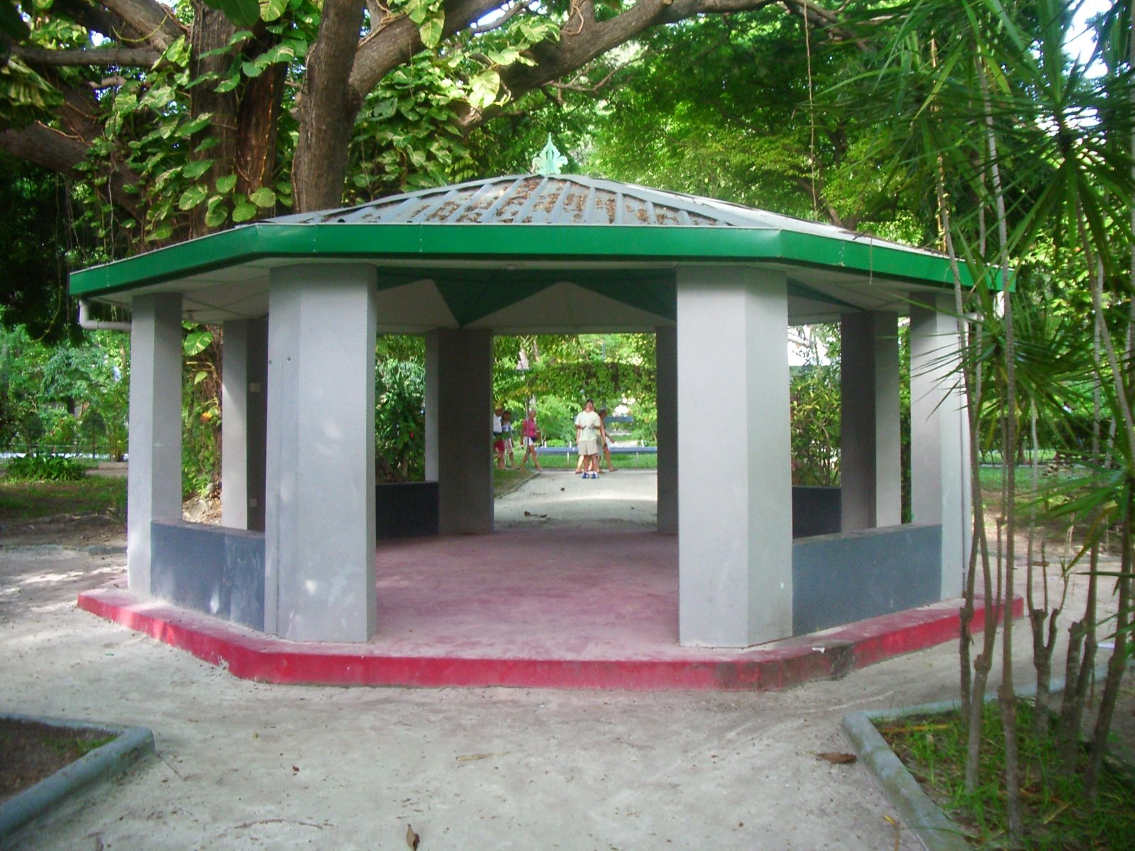 Glorieta als "Jardins del Sultà" a Male; foto feta per J. Ollé el juliol del 2006.